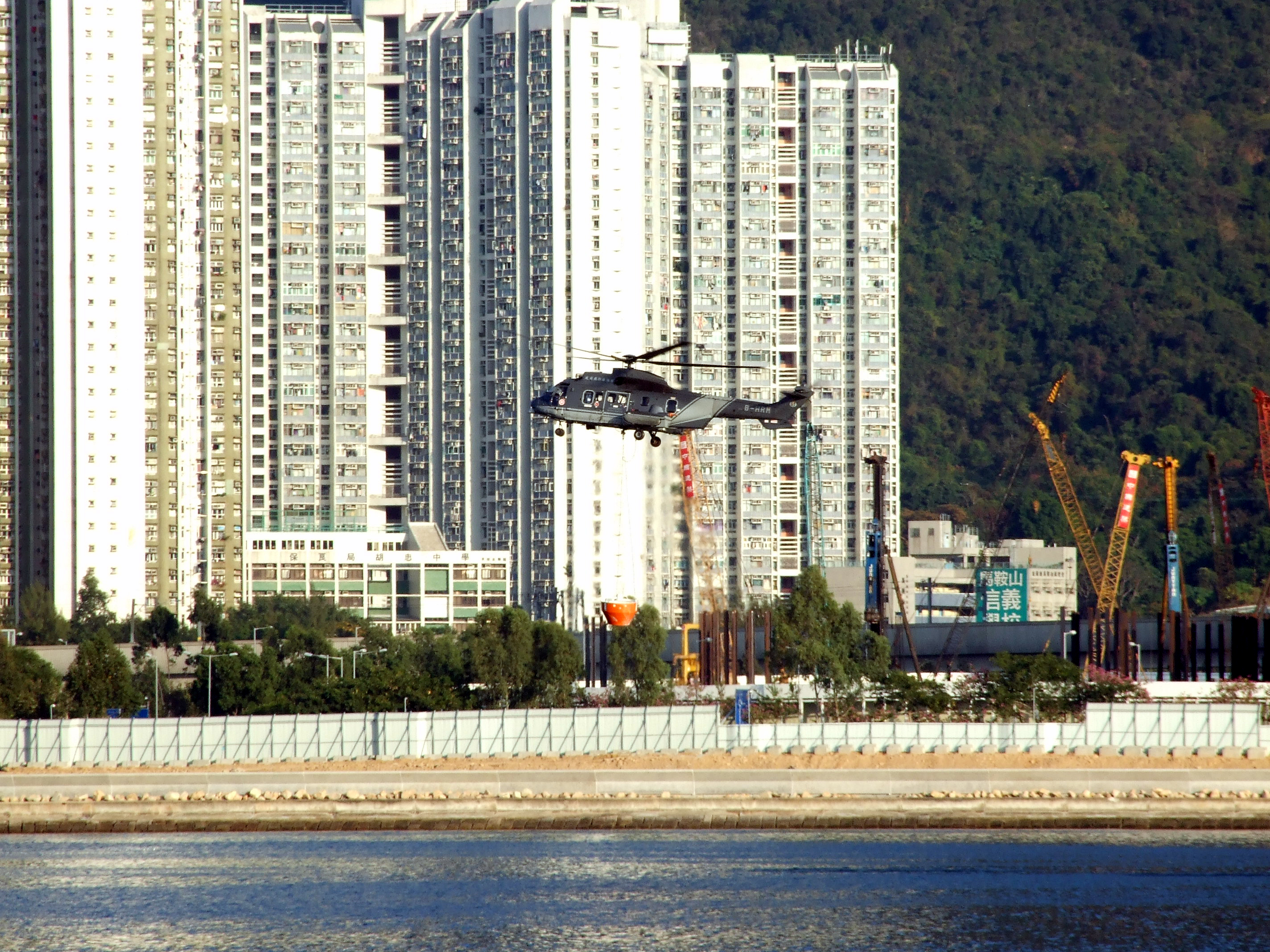 執勤中的超級美洲豹編號B-HRM